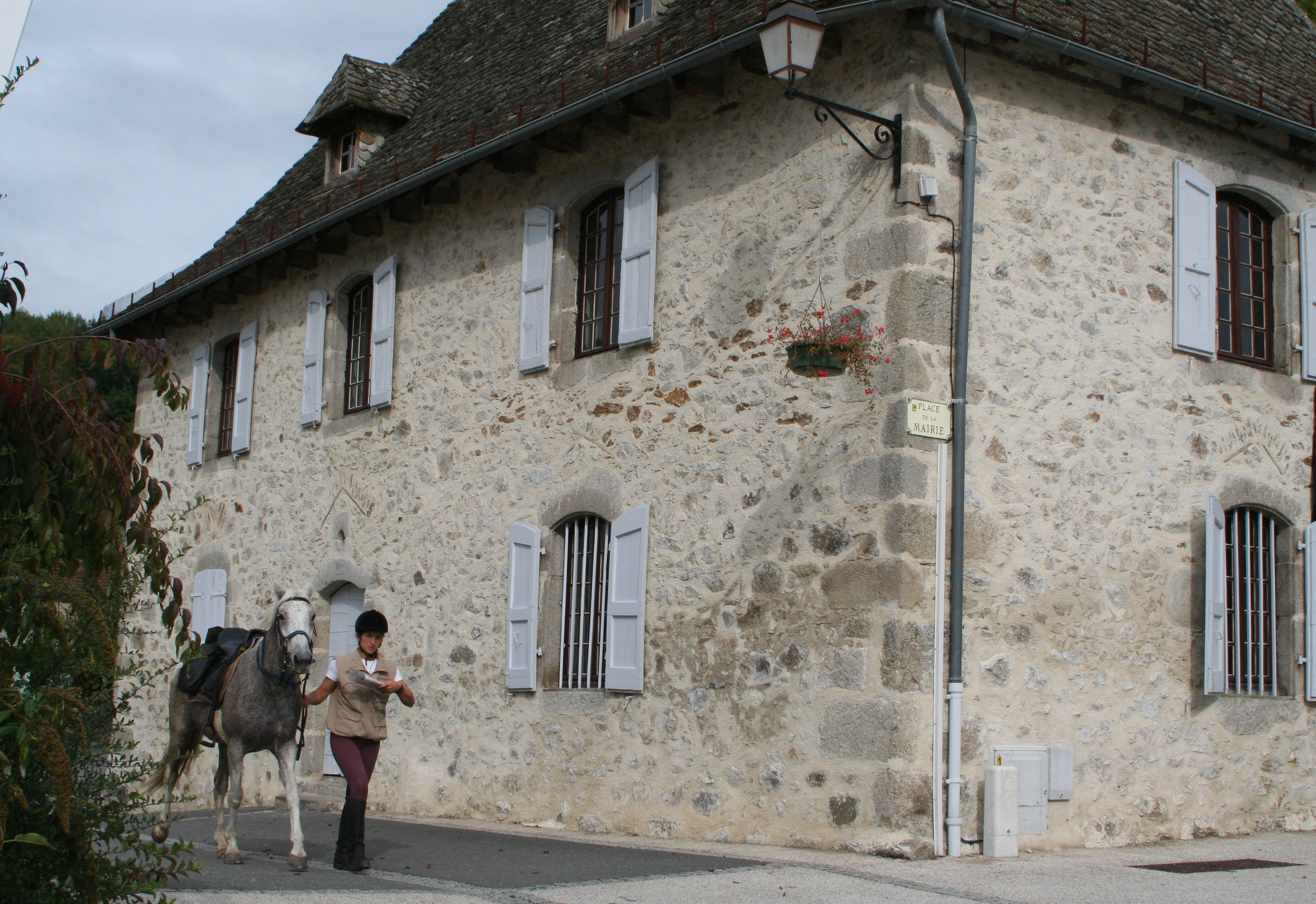 Parcours d'orientation équestre traversant le bourg de Boisset. Auteur : R. Saint-André (Boisset) Photo libre de droit